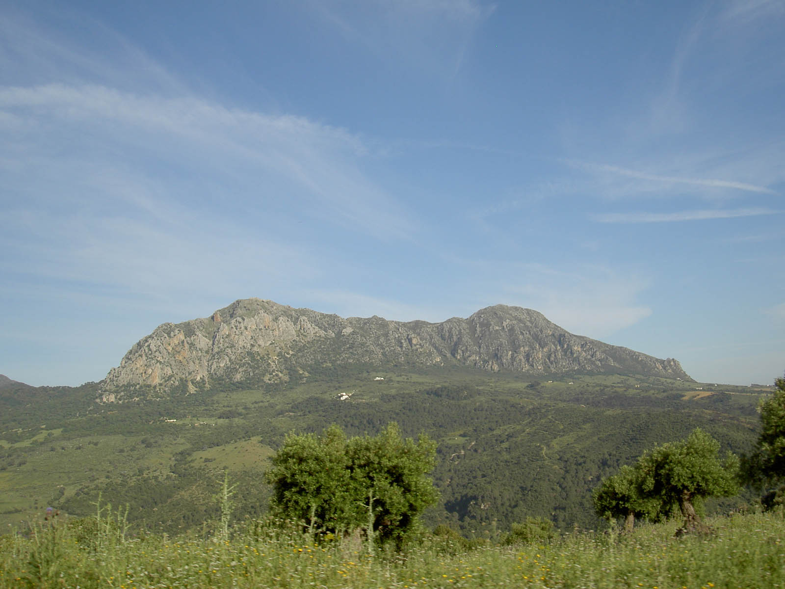 20070518 Siera Crestillina